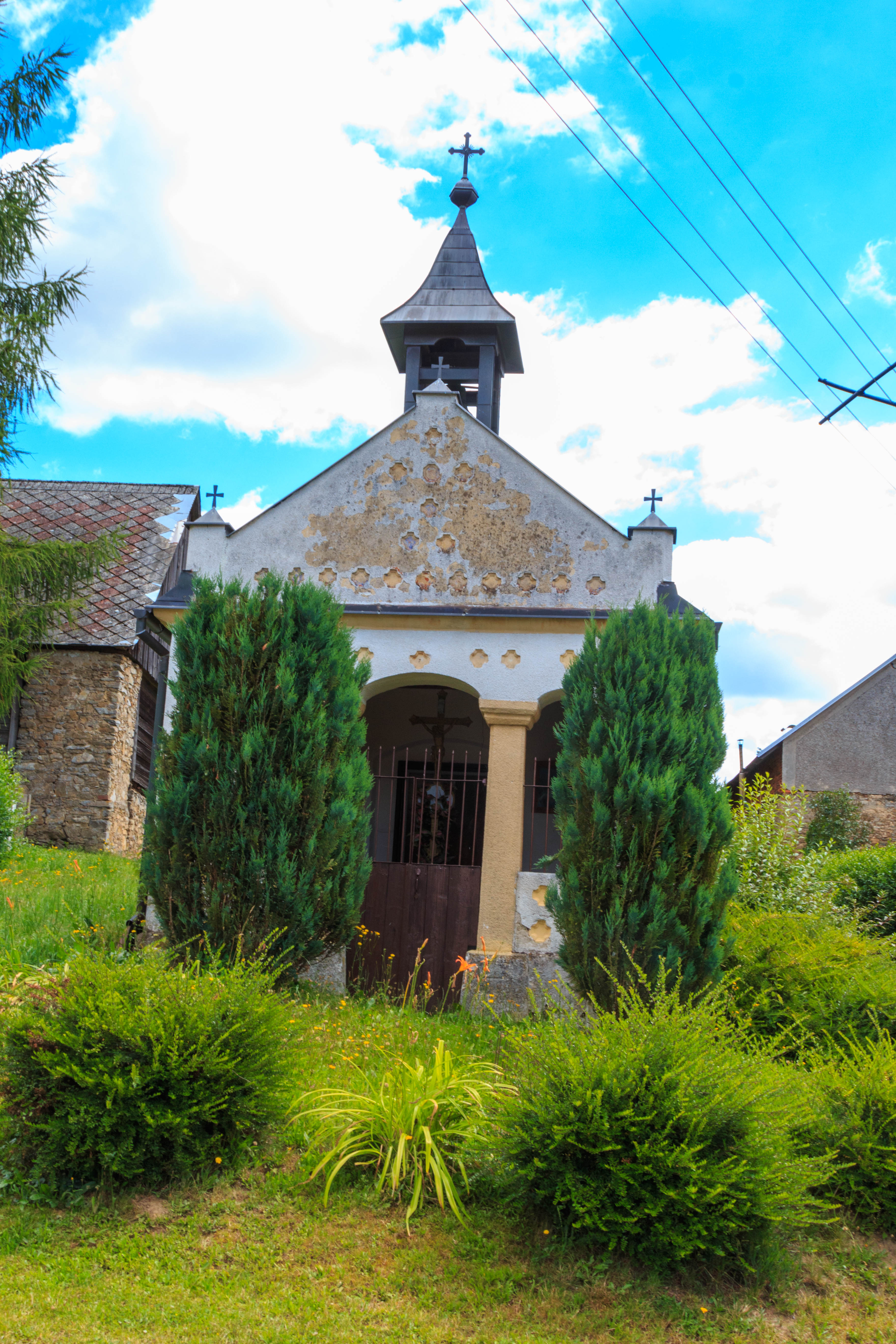 Zdeslavice u Číhošti kaple